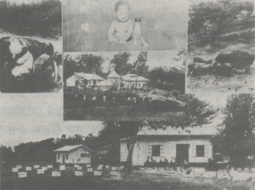 송도고등학교 부설 송도목장(우측, 중앙 상단), 송도농장(좌측 상단), 고등학교 실습동(중앙, 하단) 사진